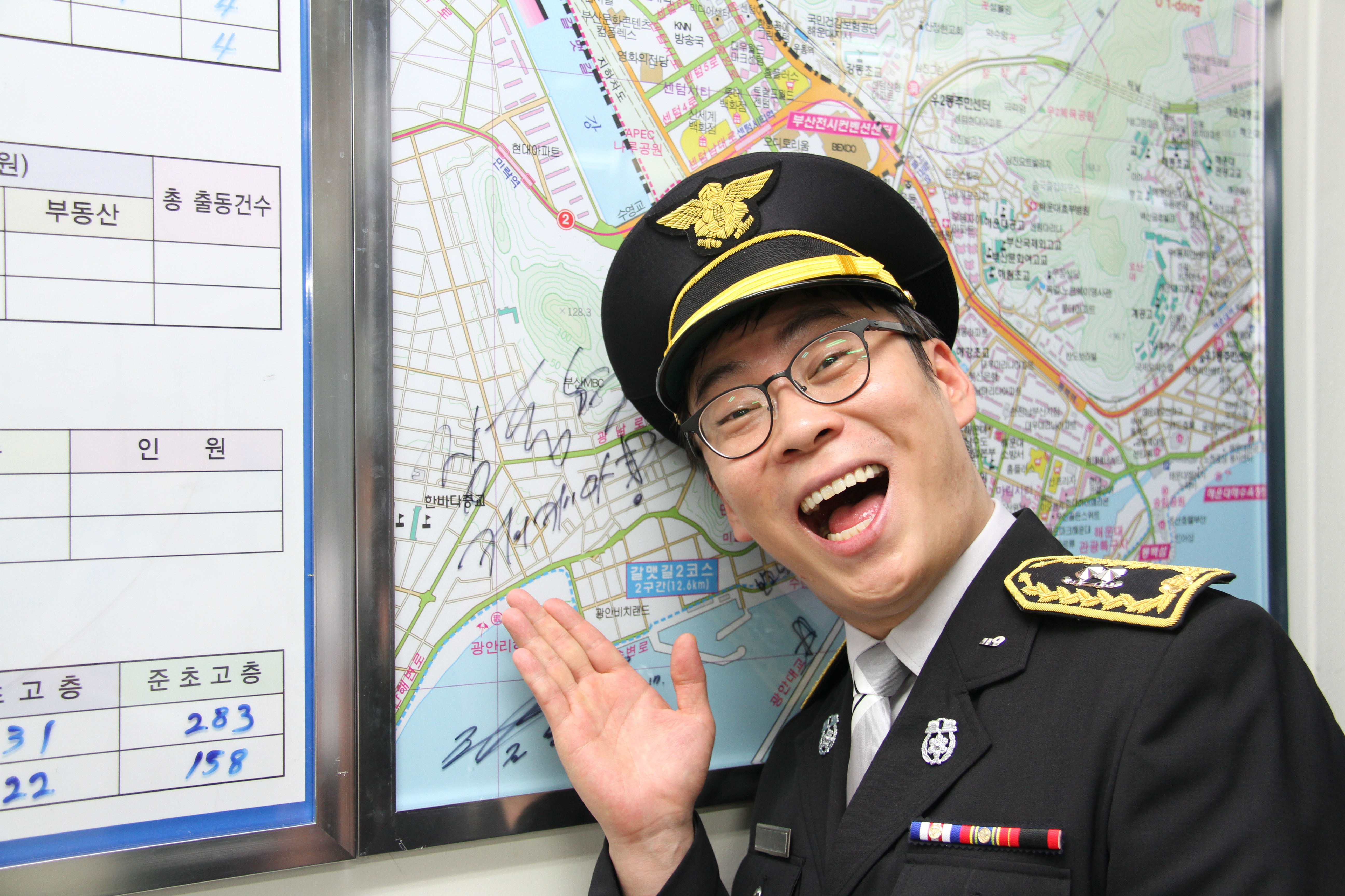 서울특별시 소방재난본부 소장 사진. Photos of Seoul Metropolitan Fire and Disaster Headquarters. Declaration of consent(sent to ). 이 파일은 크리에이티브 커먼즈 저작자표시-동일조건변경허락 4.0 국제 라이선스로 배포됩니다. 단 누구인지 구별 가능한 특정 인물이 사진에 포함되어 있을 경우 사용 전에 서울특별시 소방재난본부 및 해당 인물의 승인을 받으셔야합니다. 감사합니다.